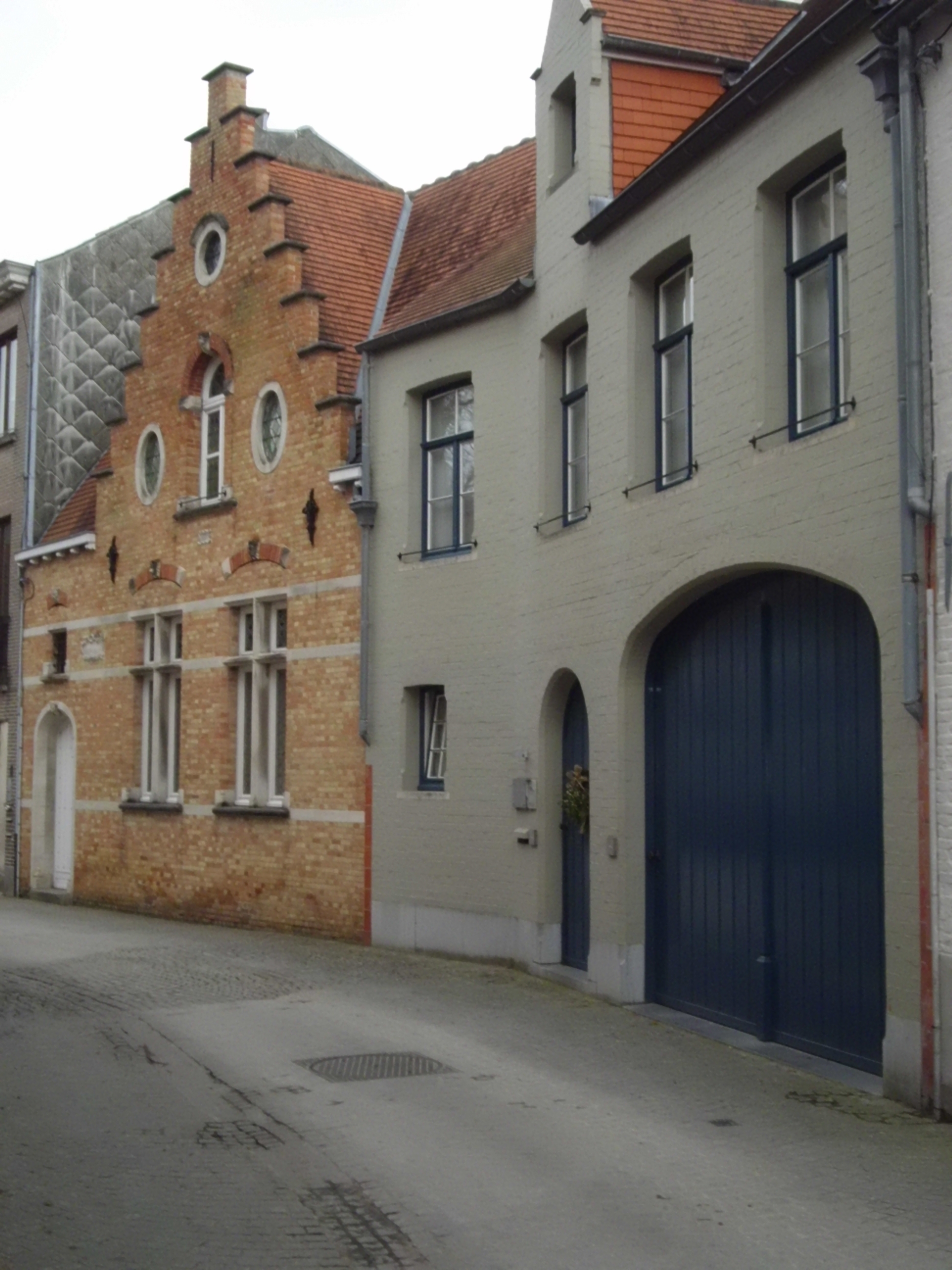 Huizen Groeninge 53-55, 8000 Brugge. Links nr. 53: "Boekenzaal der Zondagsschool" of "Katholieke Volksbibliotheek". Herbouwd door architect L. Charels in 1904. Rechts nr. 55: vermoedelijk ingang van de avondschool, voorloper van het Vrij Technisch Instituut Brugge.